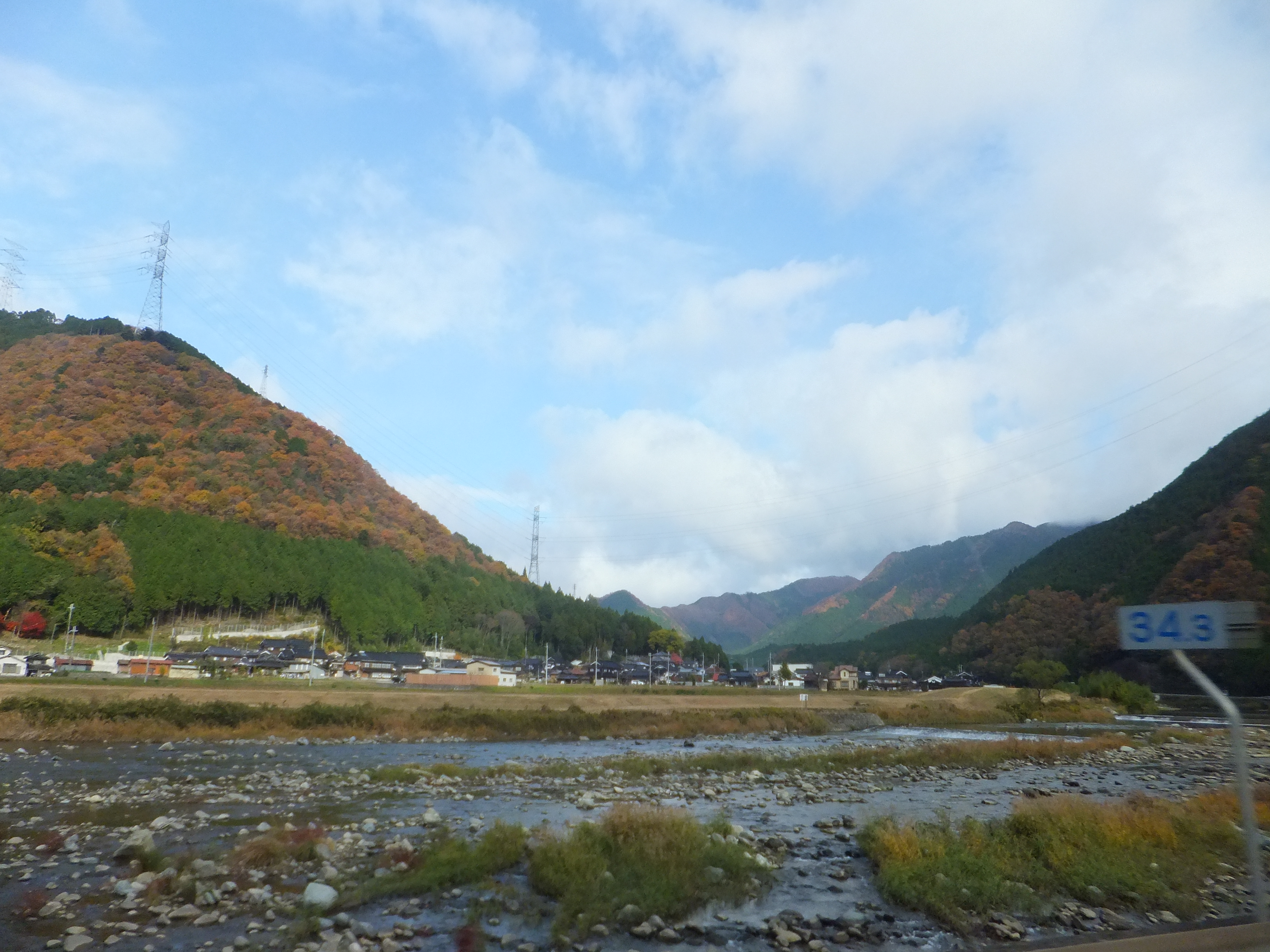 兵庫県宍粟市一宮町嶋田 揖保川